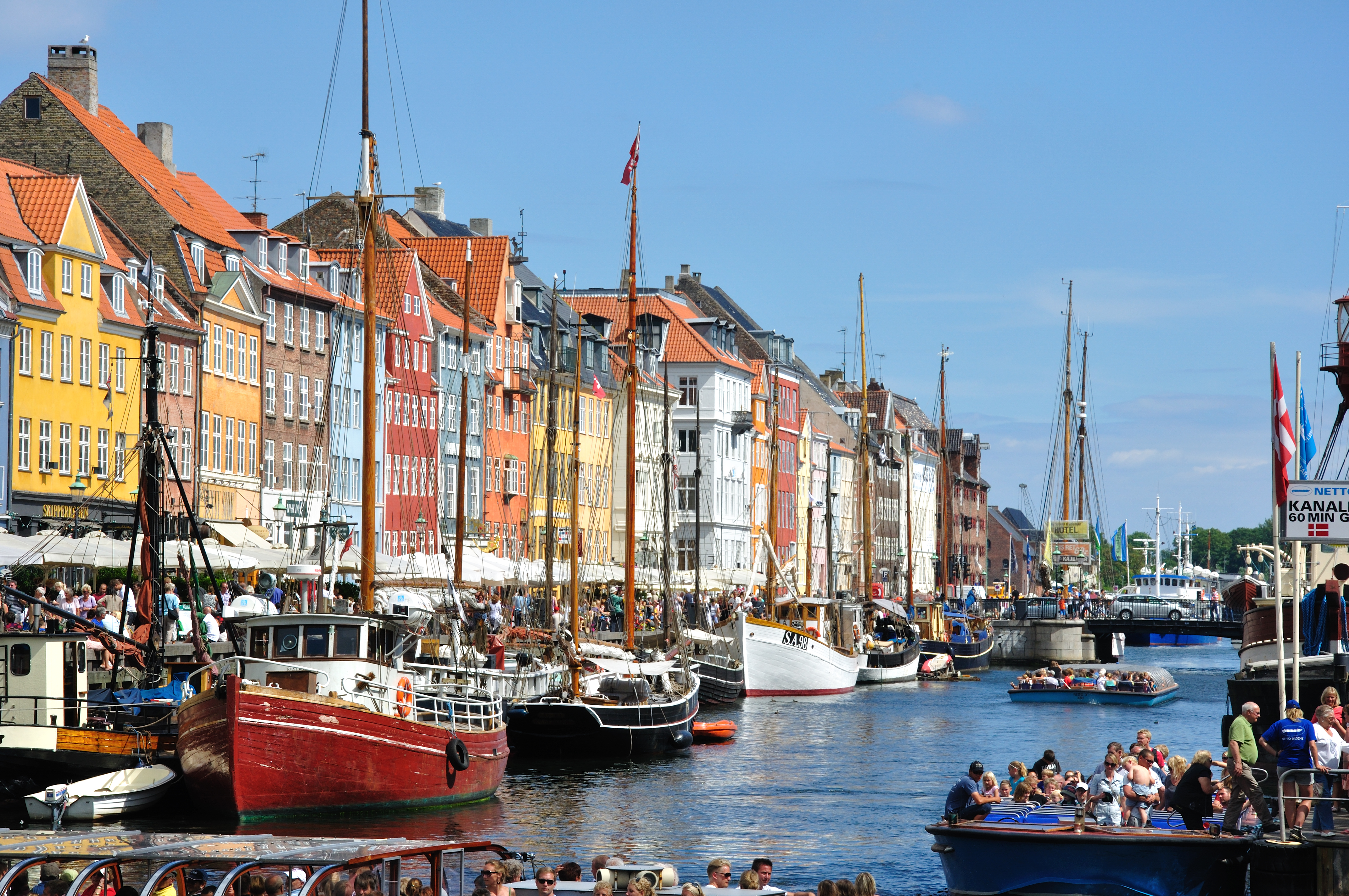 Nyhavn in Copenhagen, Denmark